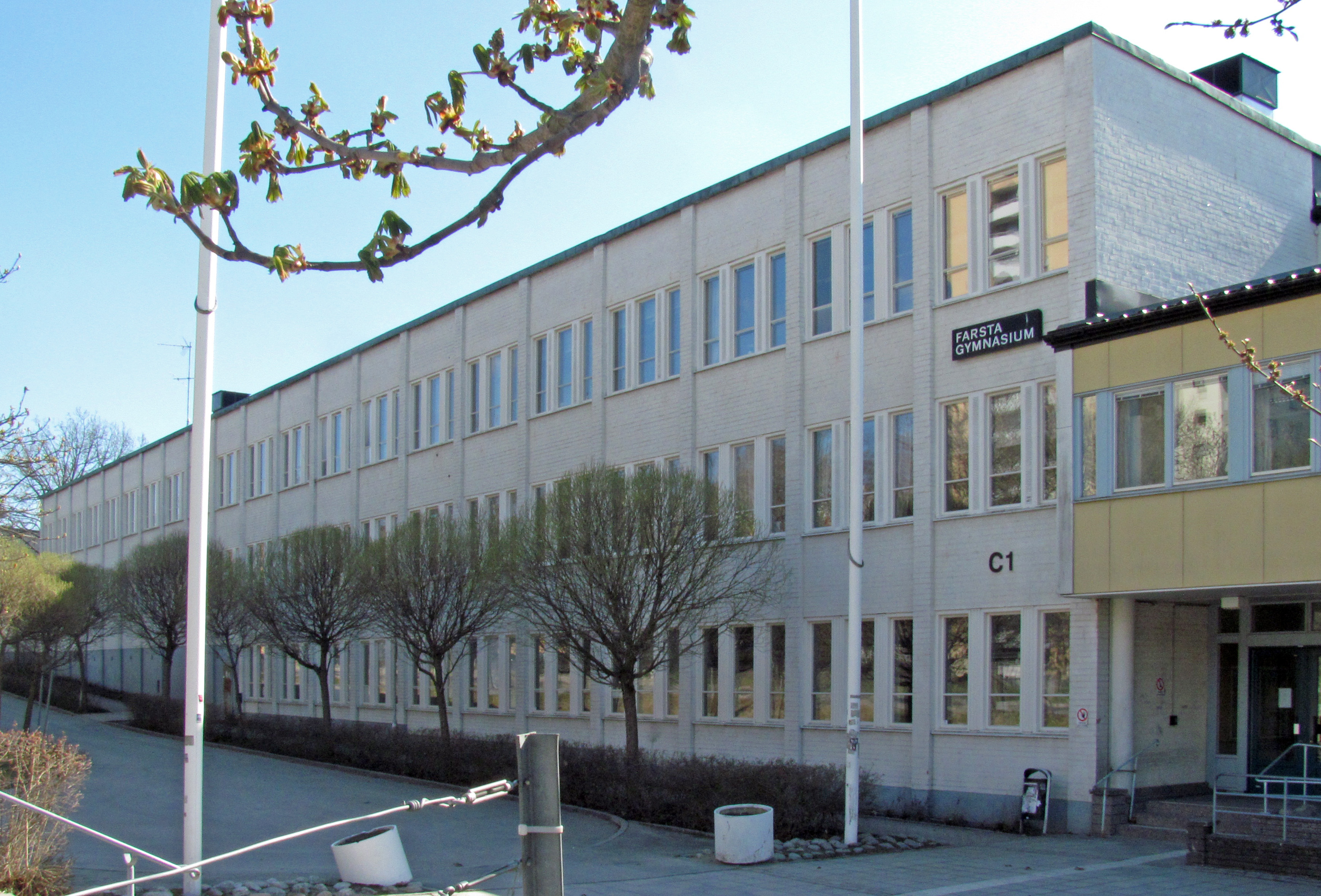 Farsta gymnasium